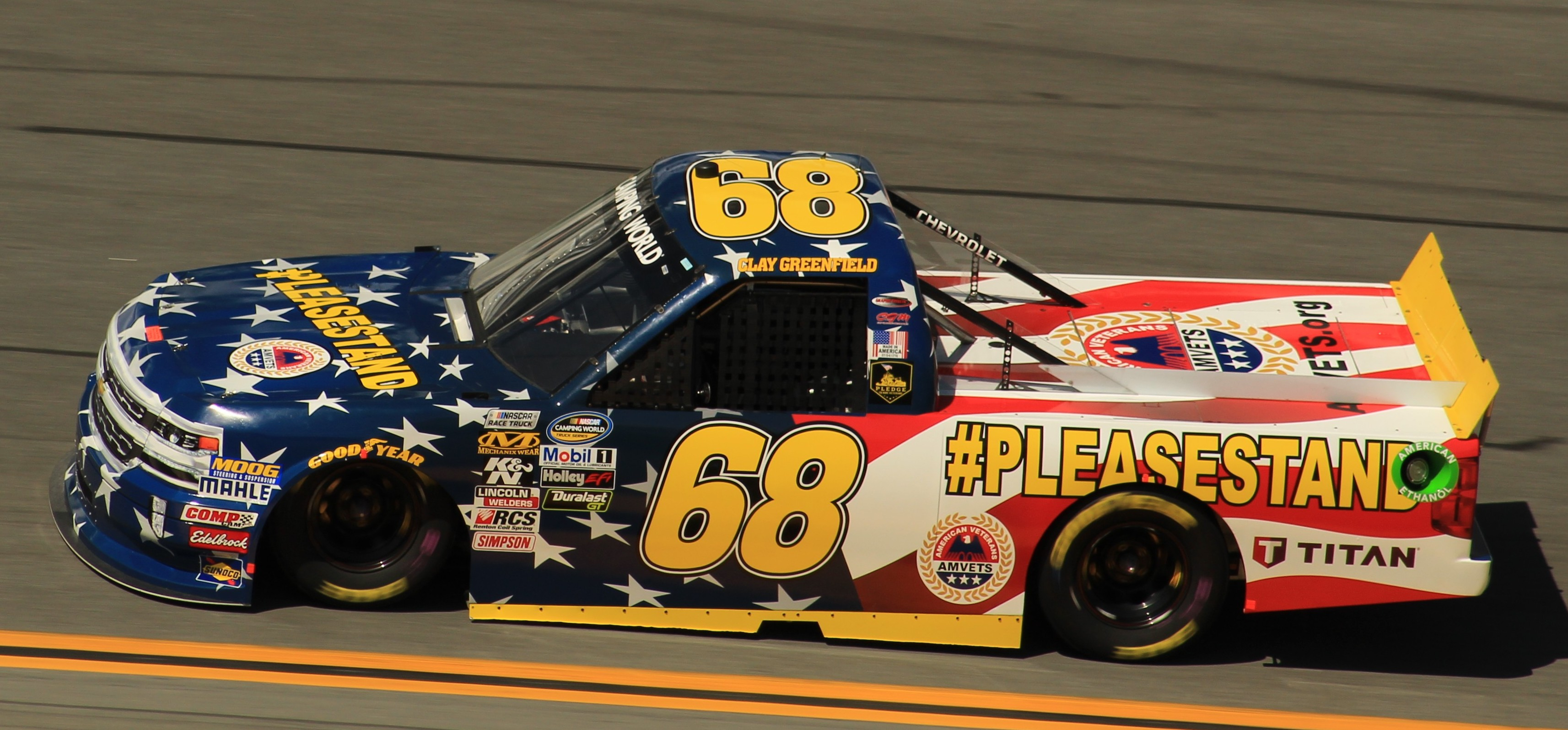 2018 Daytona 500